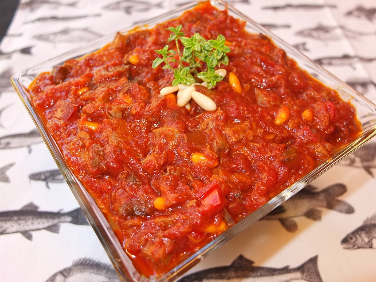 Plat de Titaina